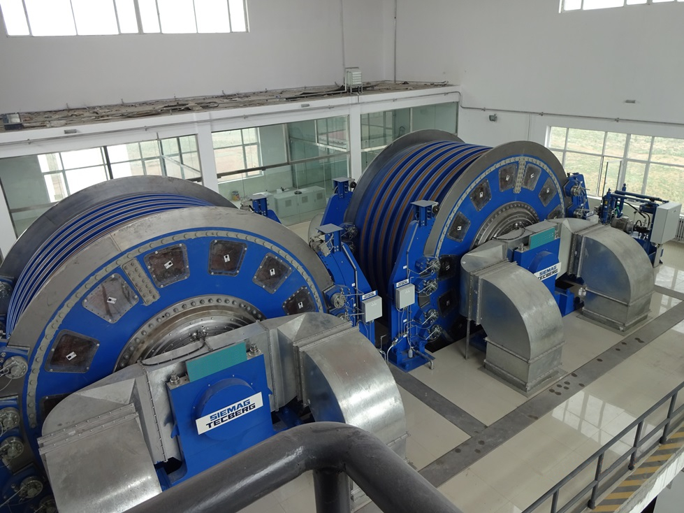 Aufnahme von 2 SIEMAG TECBERG 6-Seil Koepe-Fördermaschinen (Koepe integriert) im Hauptschacht des Bergwerks Hongqinghe in China.